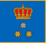 Flag of Viekšniai